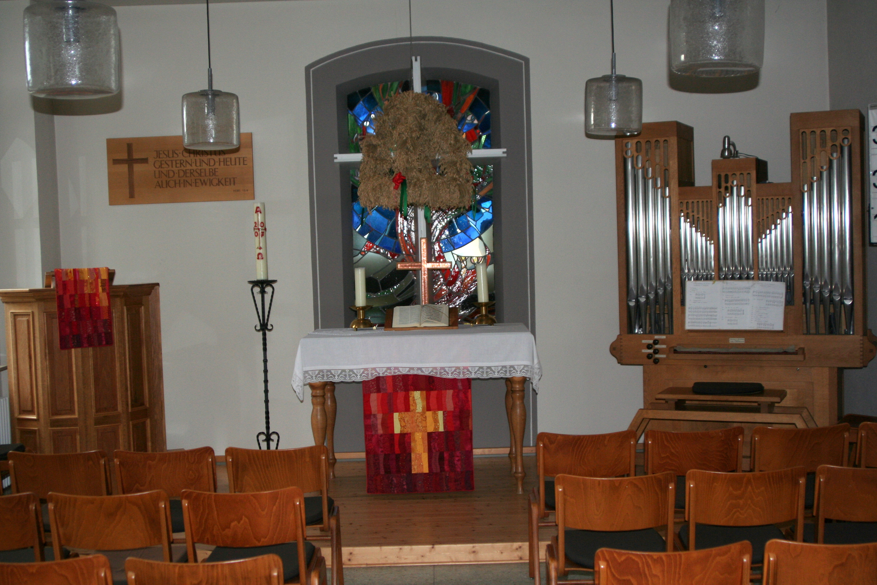 Evangelische Kirche Stockhausen, Gemeinde Grünberg, Landkreis Gießen, Hessen, Deutschland